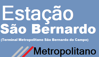 Terminal Metropolitano São Bernardo do Campo